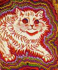 Gato Psicótico criado pelo autor.